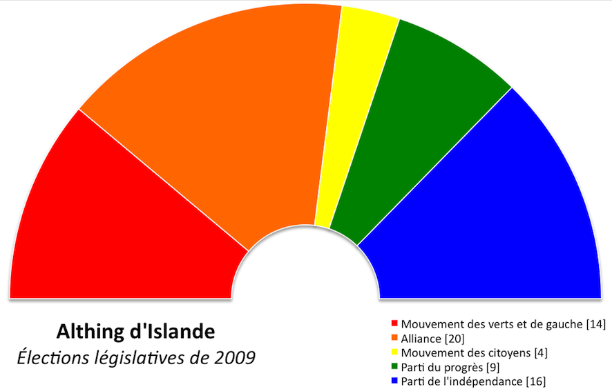 Composition politique de l'Althing islandais après les élections de 2009.